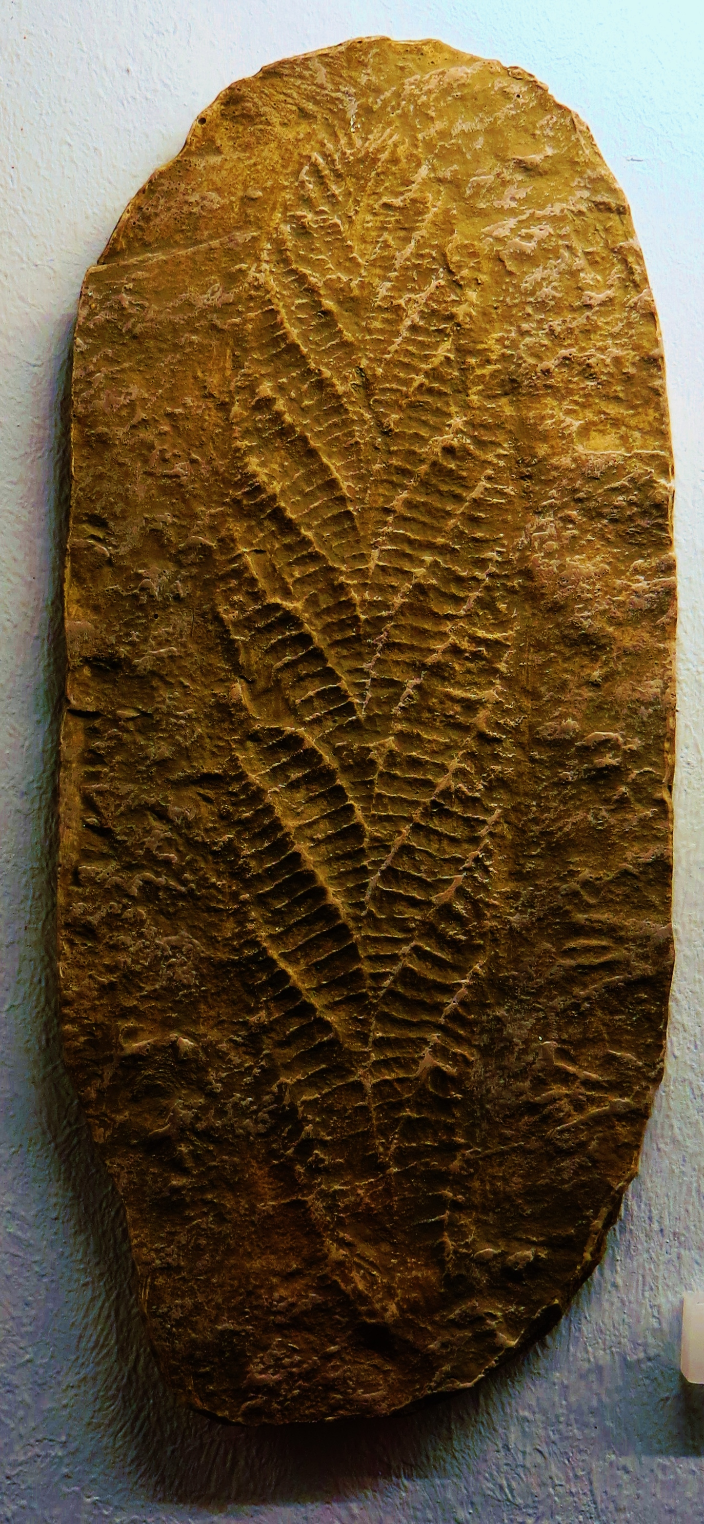 Fossil of Charnia, an ancient being- Took the picture at Museum of Paleontology of Tuebingen